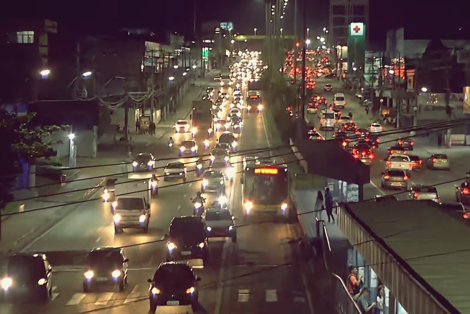 Avenida Torquato Tapajós em hora de rush, em Manaus, capital do Estado do Amazonas.